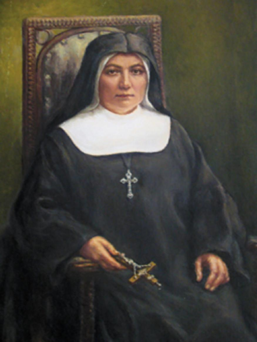 Obraz Marii Karłowskiej